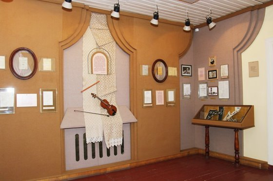 Выгляд адной з заляў літаратурнай часткі музея Францішка Багушэвіча ў Кушлянах. Фота з сайта Дзяржаўнага музея гісторыі беларускай літаратуры.